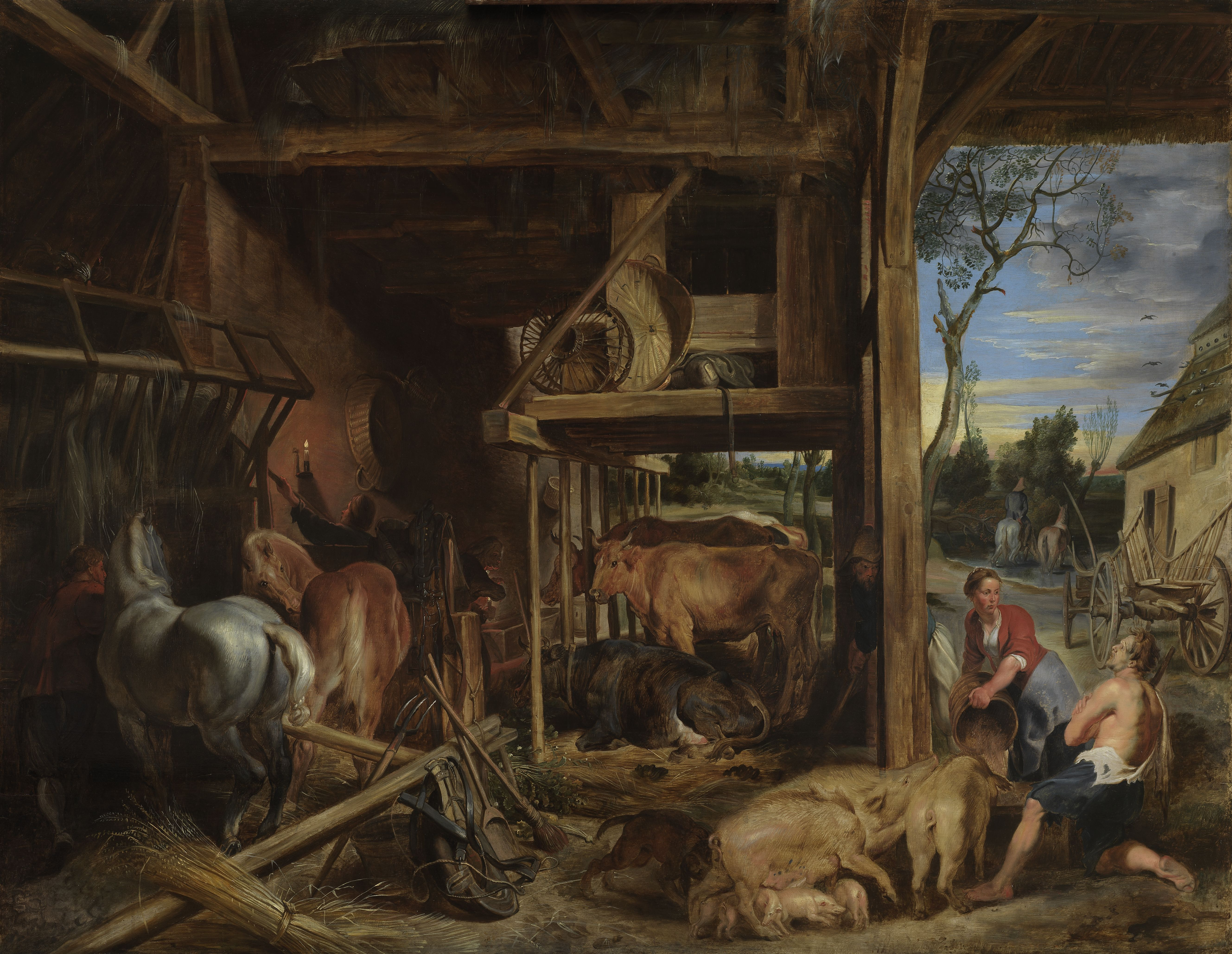 schilderij ( Peter Paul Rubens( koninklijk museum voor schone kunsten antwerpen